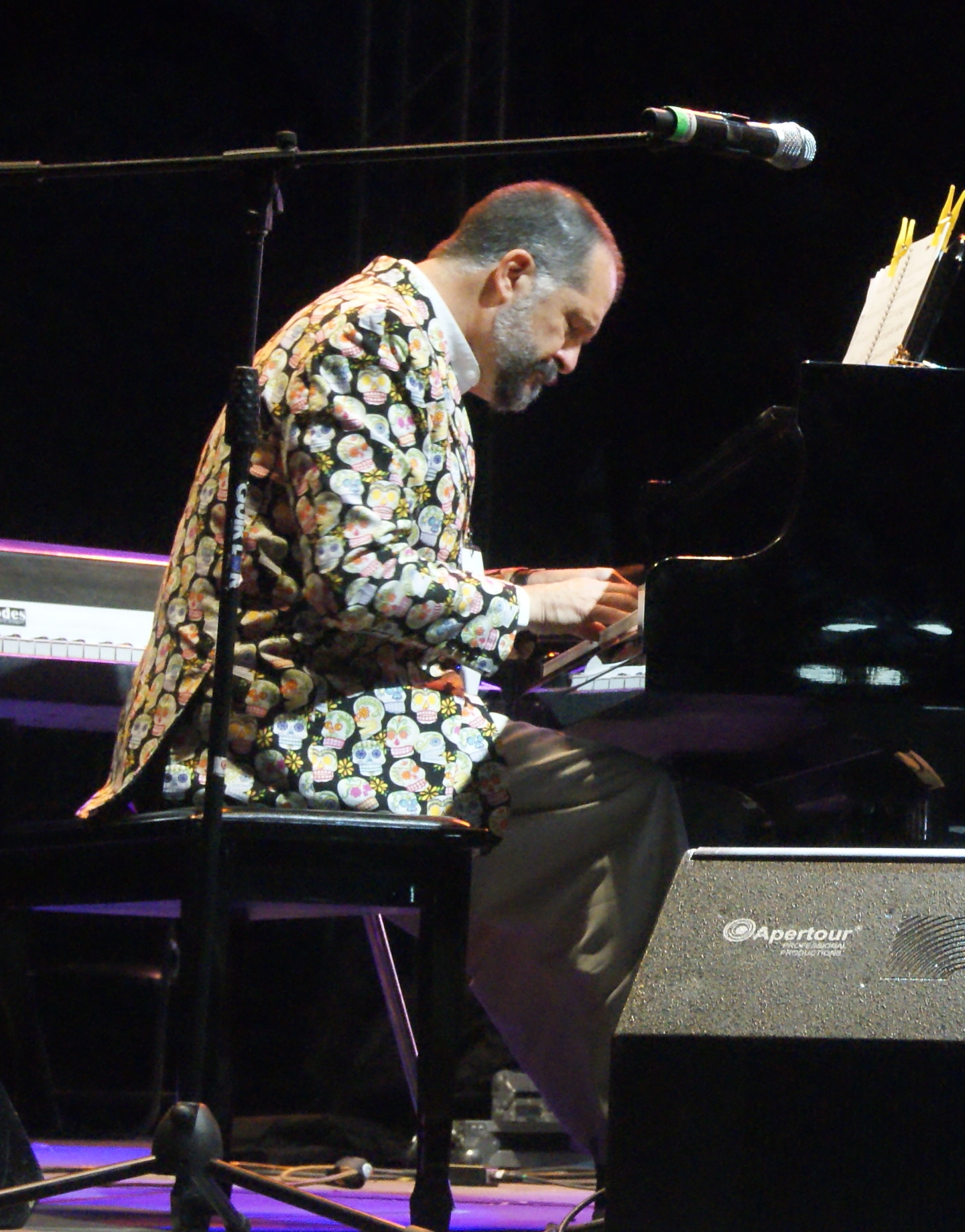 Sacbé, trío de jazz de los hermanos Eugenio, Enrique y Fernando Toussaint en el Zócalo de Puebla durante su presentación en el Festival Barroquísimo 2010